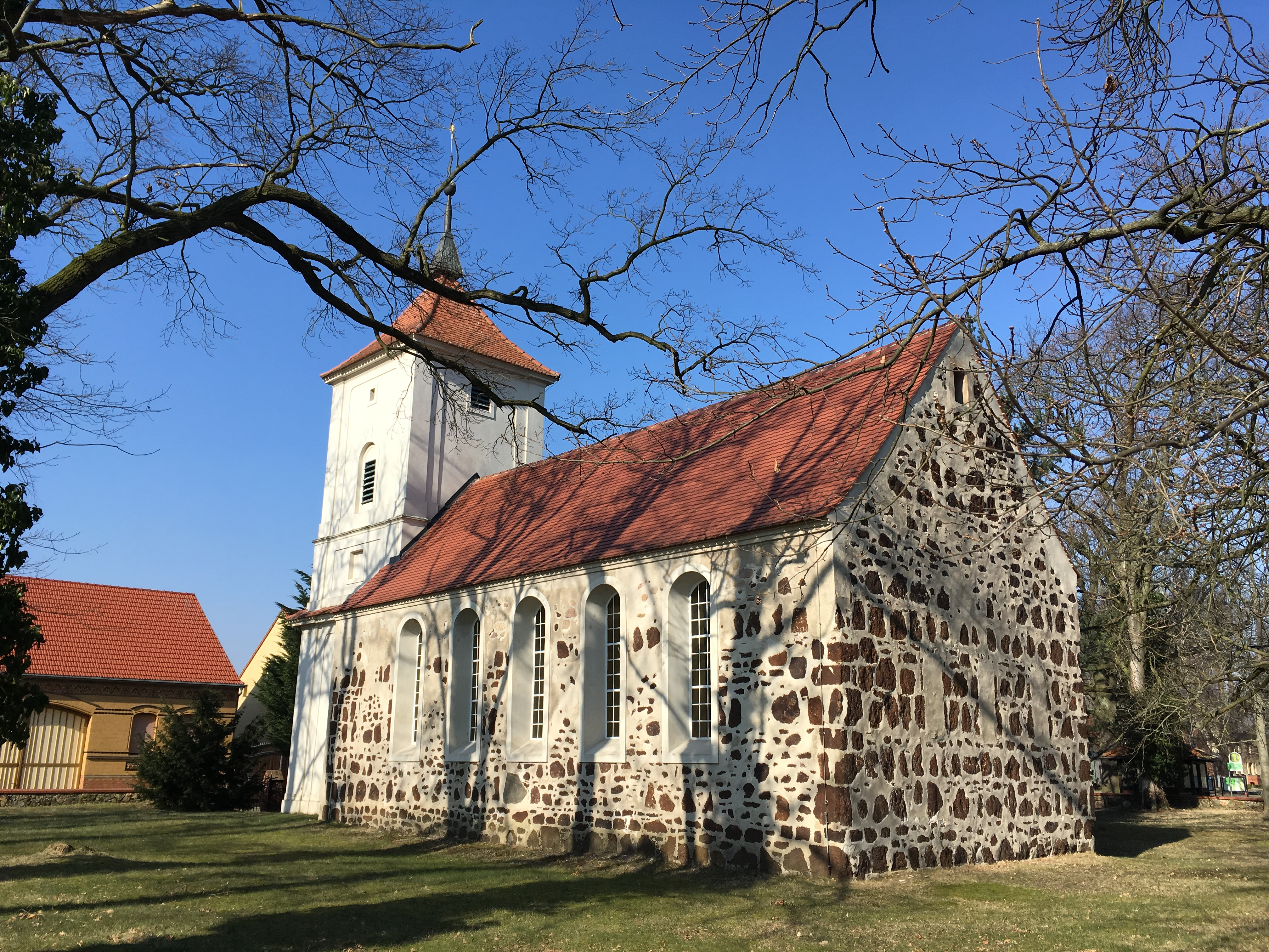 Die Dorfkirche Brachwitz ist eine spätgotische Saalkirche in Brachwitz, Stadt Treuenbrietzen im Landkreis Potsdam-Mittelmark. Sie wurde überwiegend aus Raseneisensteinen errichtet. In ihrem Innern steht unter anderem ein Kanzelaltar aus der ersten Hälfte des 18. Jahrhunderts.